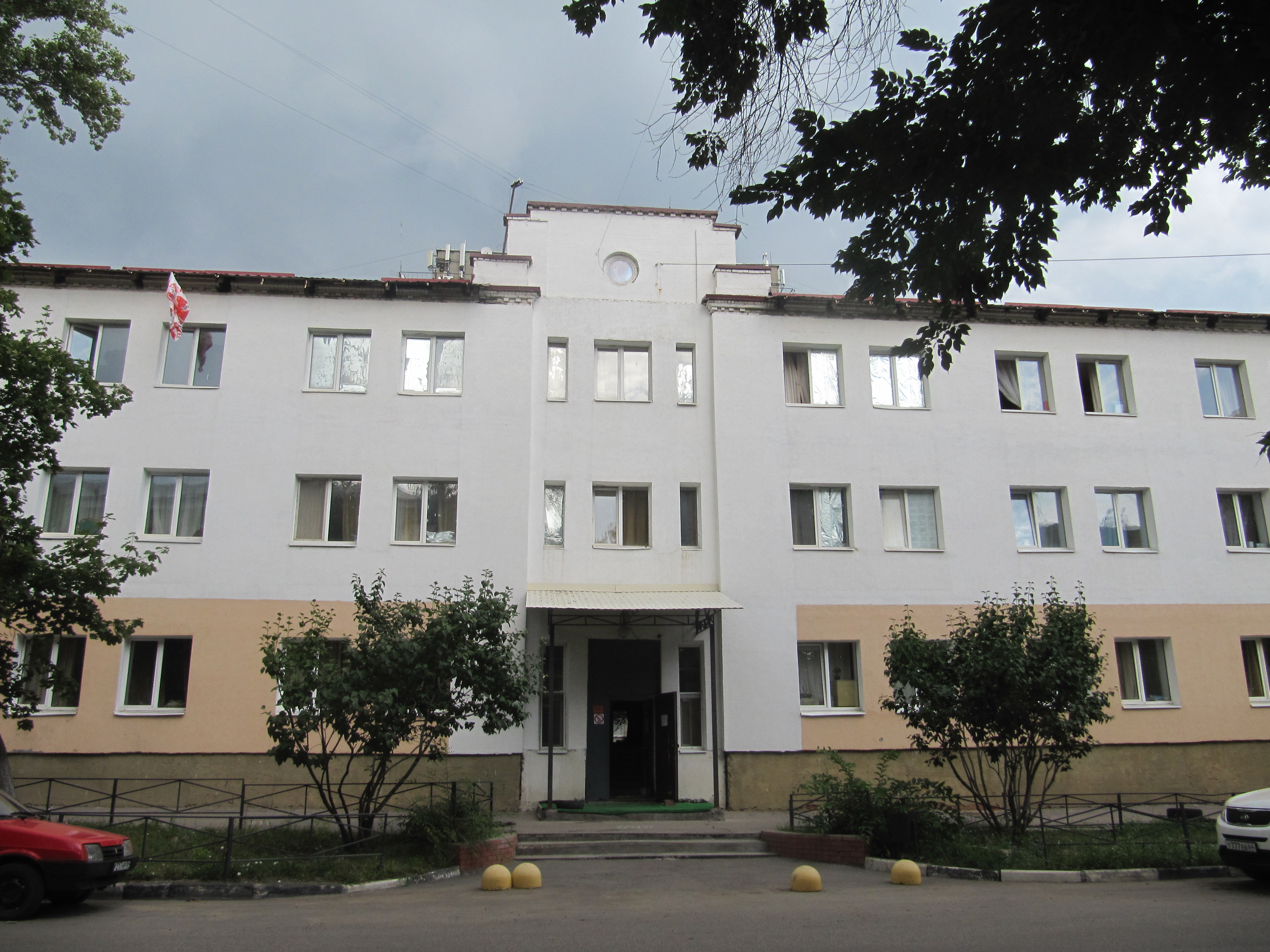 Общежитие №1 СГМУ, ул. Бахметьевская 4, Саратов.